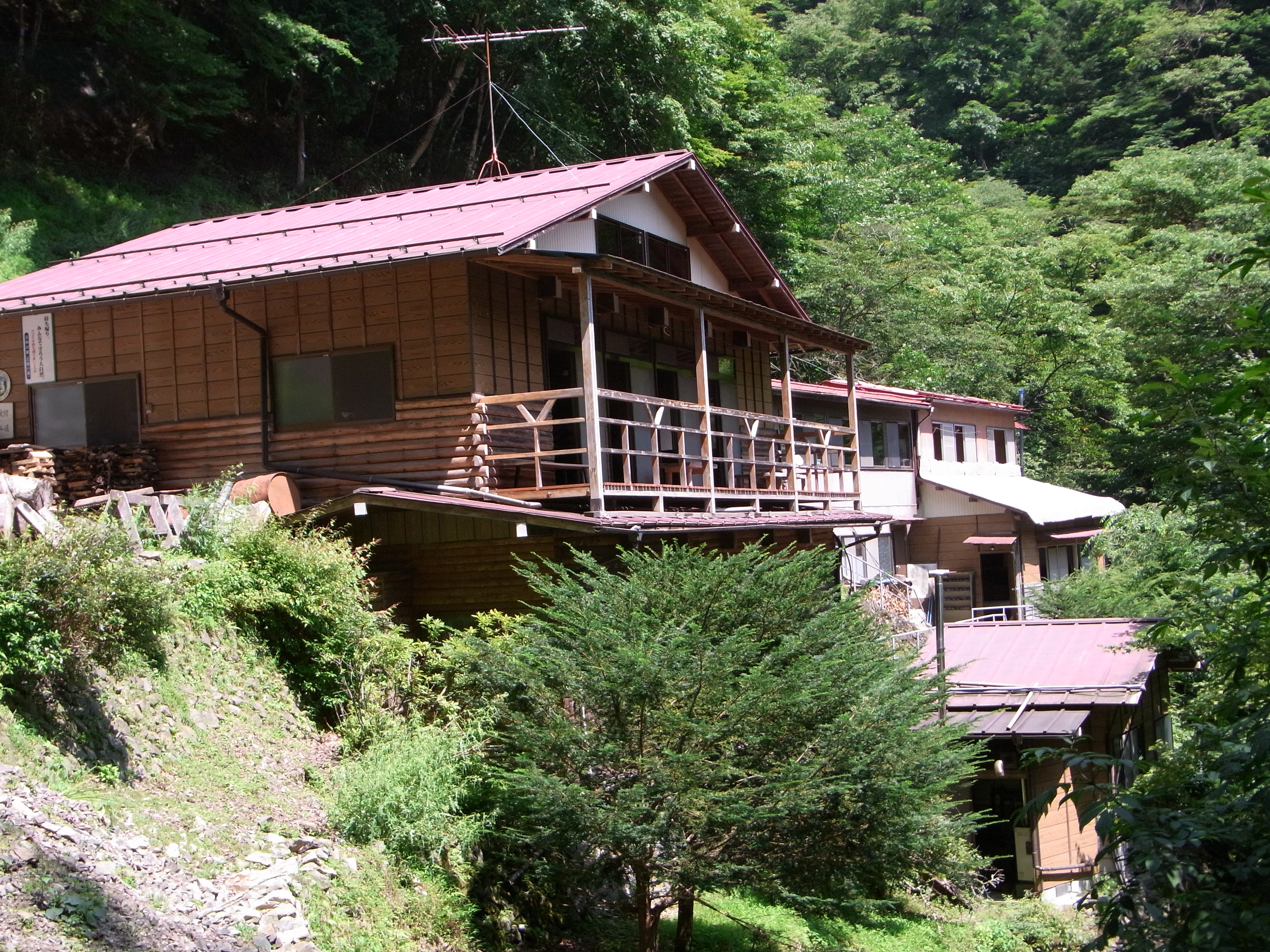 三条の湯